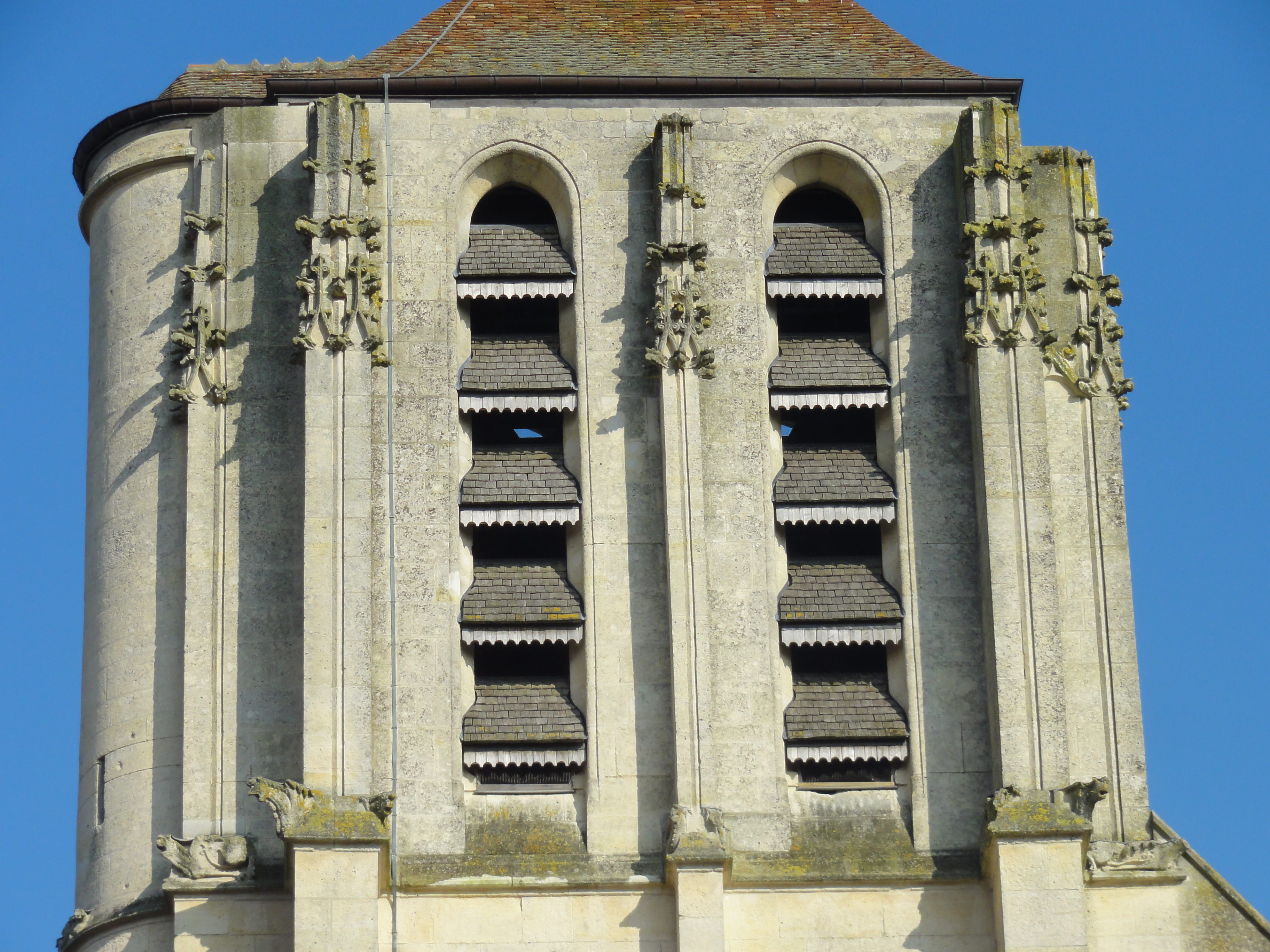 Église Saint-Michel du Mesnil-en-Thelle - voir titre.